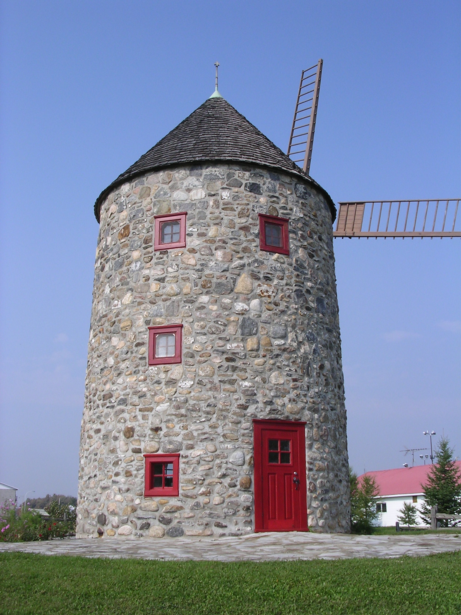 Moulin à vent de Saint-Grégoire, à Bécancour (Québec); moulin à farine